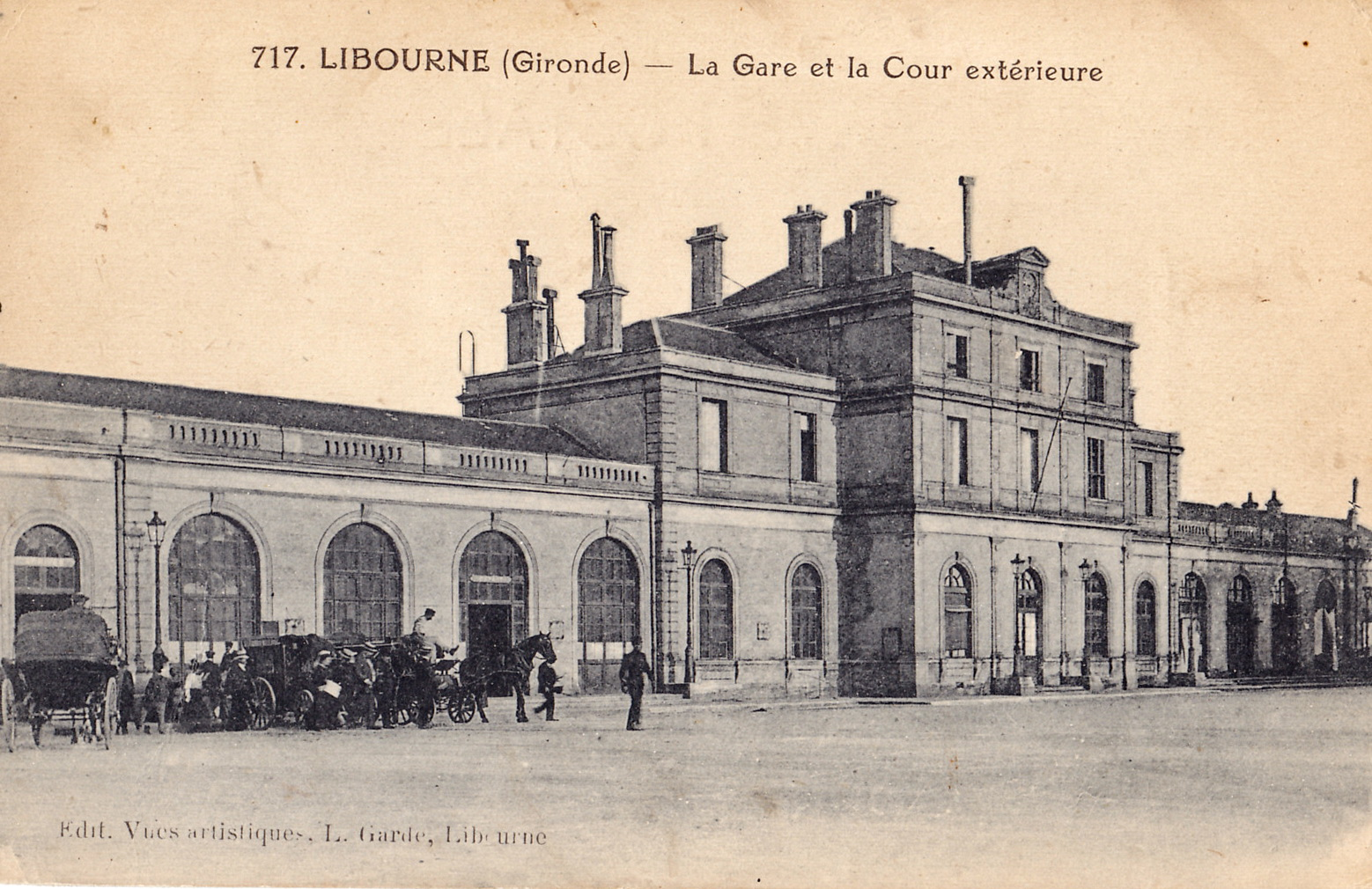 Carte postale ancienne éditée par L. Garde à Libourne : LIBOURNE - La Gare et la Cour extérieure